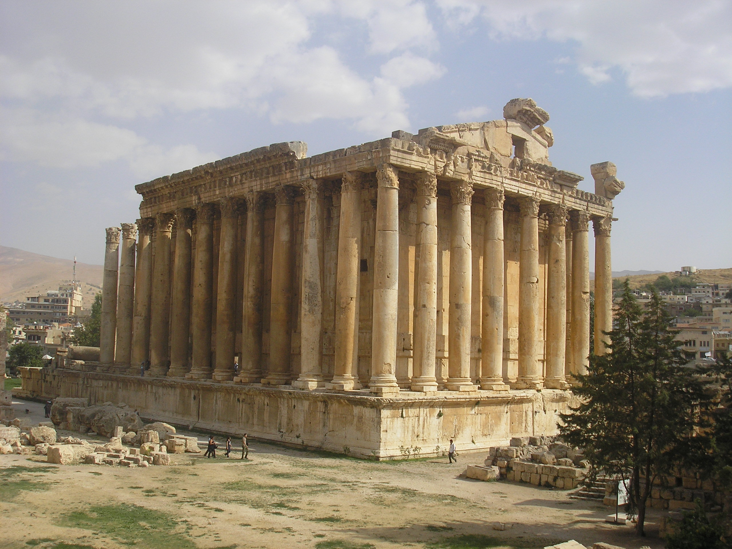 Bacchustempel in Baalbeck (Libanon)